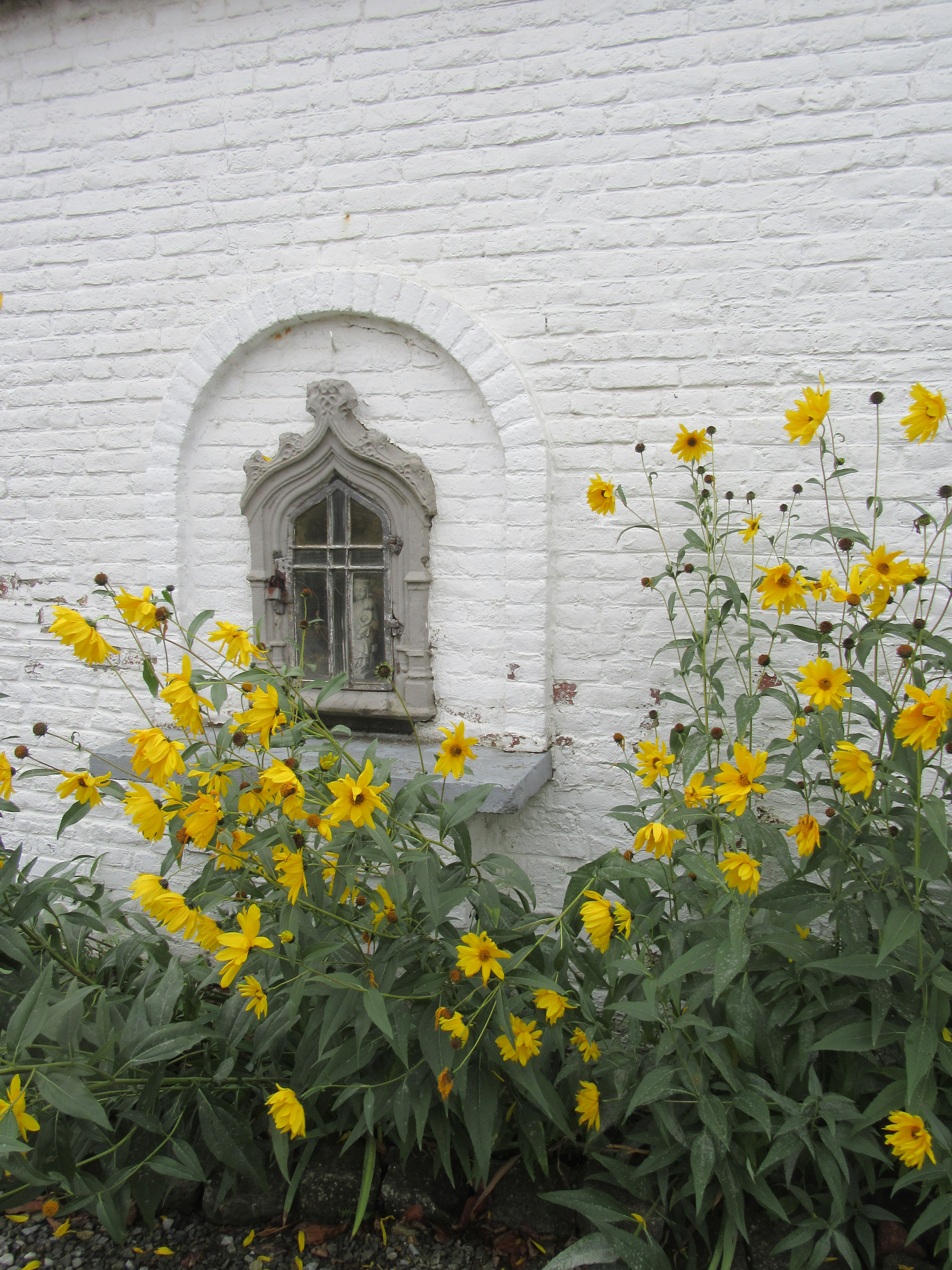 Potale dans le mur d'un hangar